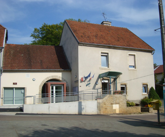 Mairie de Montcey (Haute-Saône, France).